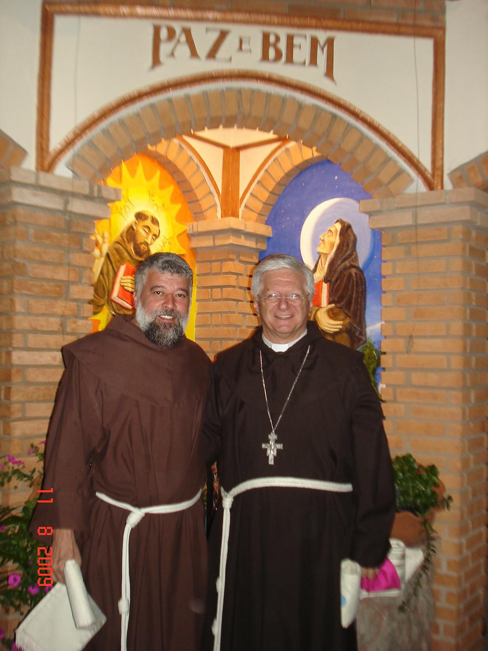 Imagem tirada ajunto ao Capitel inaugurado pelas Festividades dos 800 anos do Carisma Franciscano, na Festa de Santa de Assis, em Bauru/Sp, na presença do Pároco Frei Benedito e do Bispo de Bauru, Dom Caetano Ferrari.